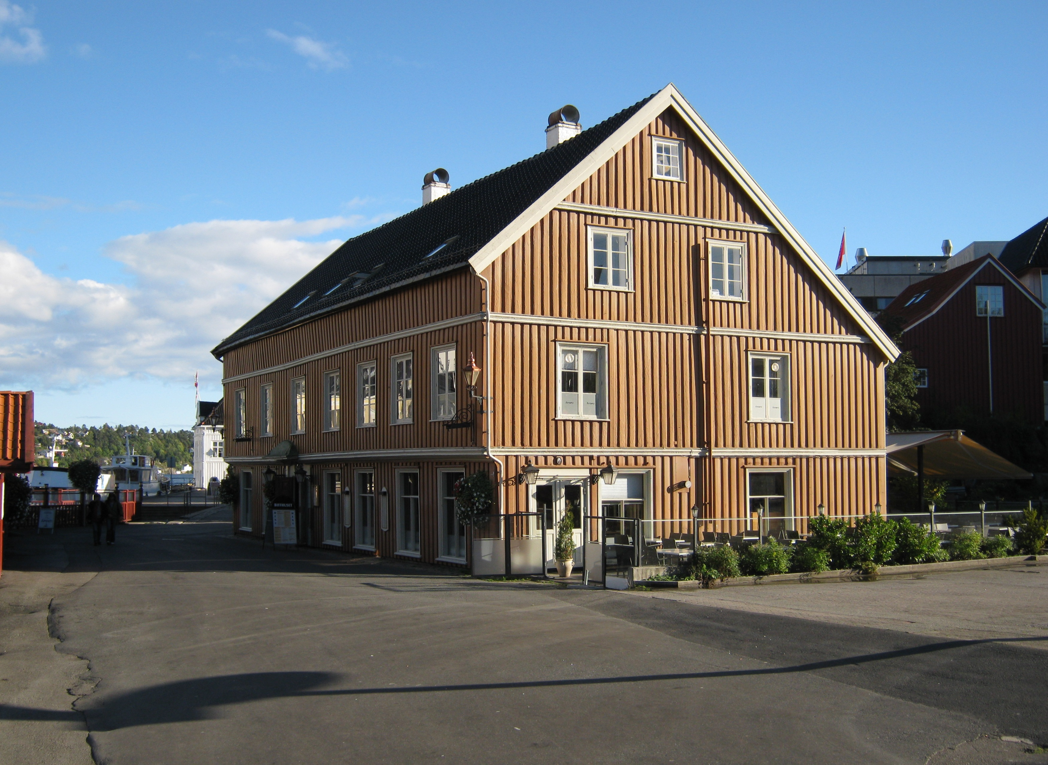 Leths hus - "Det gamle politikammer" ved kanalplassen i Arendal